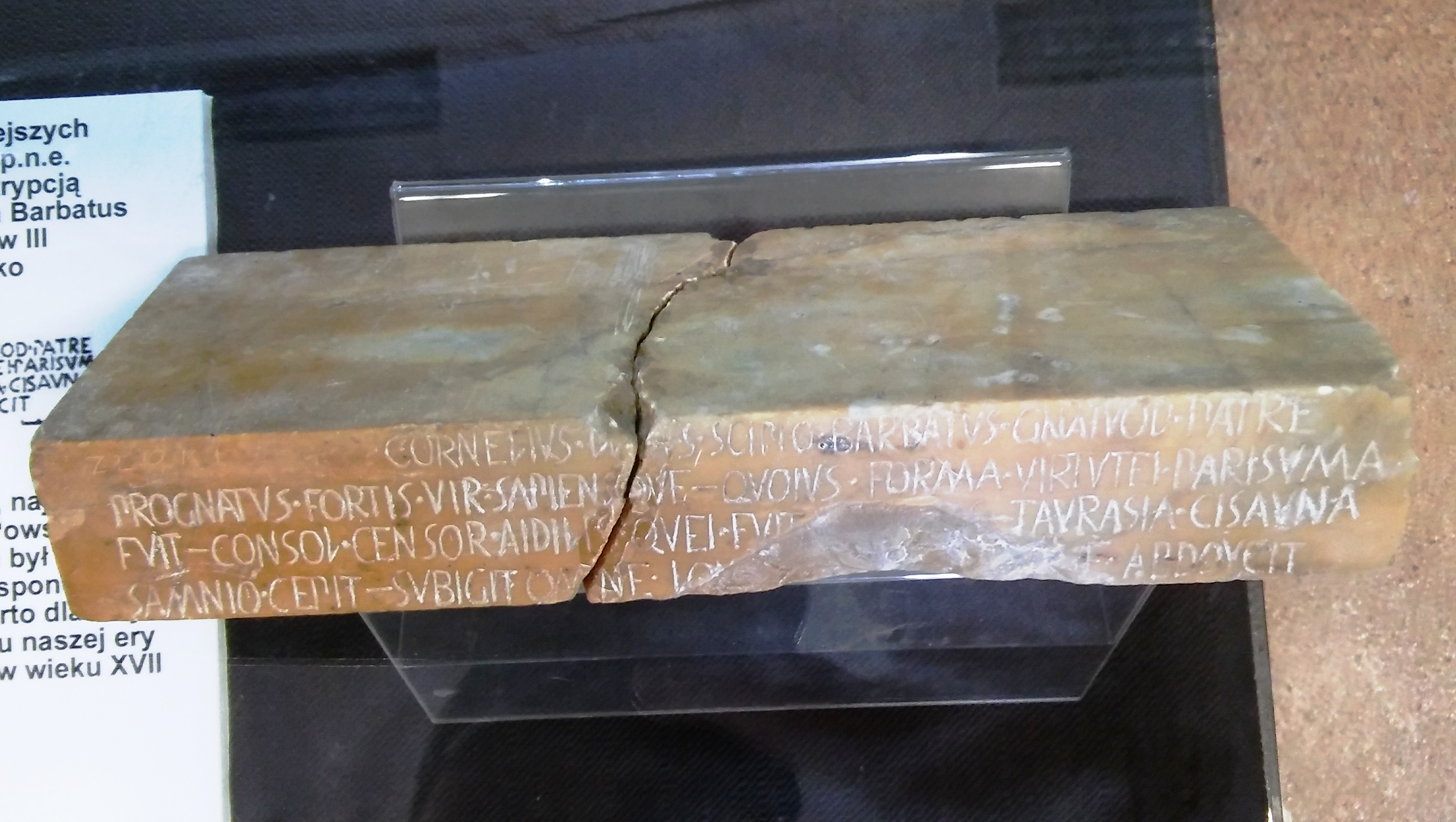 Muzeum Ziemi Braniewskiej kopia inskrypcja łacińska z sarkofagu należącego do Luciusa Corneliusa Scypiona Barbatusa, konsula z roku 298 p.n.e. wódz rzymski, który odniósł sukcesy w III wojnie samnickiej (298-290 p.n.e.). Jego zwycięstwa opisuje elogium (pochwała) na sarkofagu - najstarsza inskrypcja łacińska dotycząca postaci historycznej.